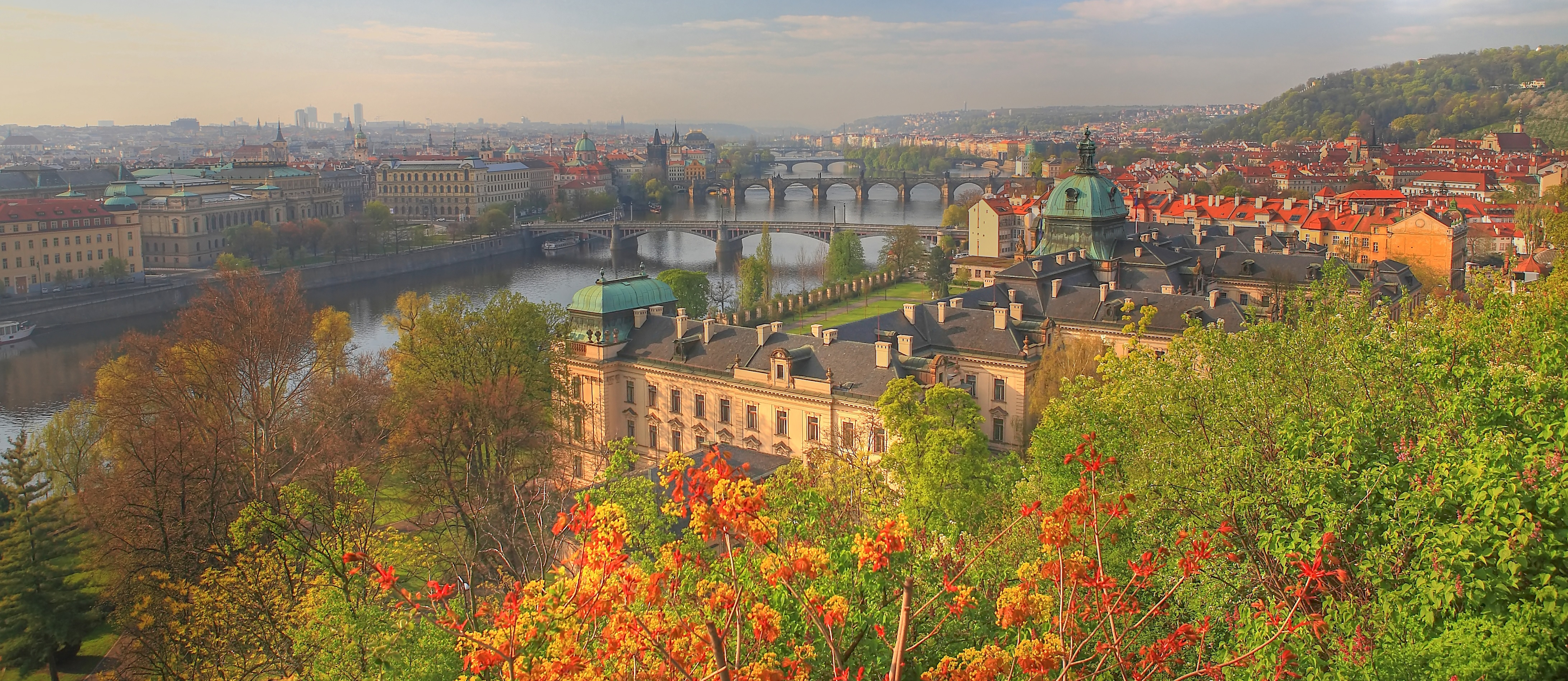 Vistas desde el parque LETNÁ - Puentes sobre el rio MOLDAVA